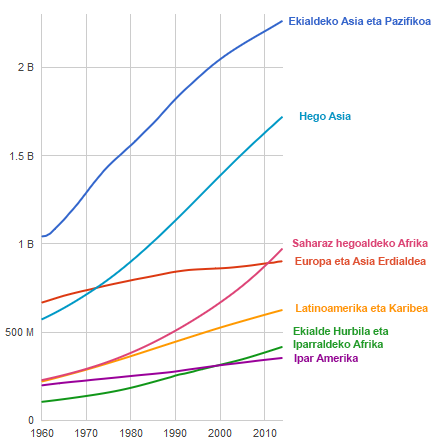 Populazioaren hazkundea kontinenteen arabera